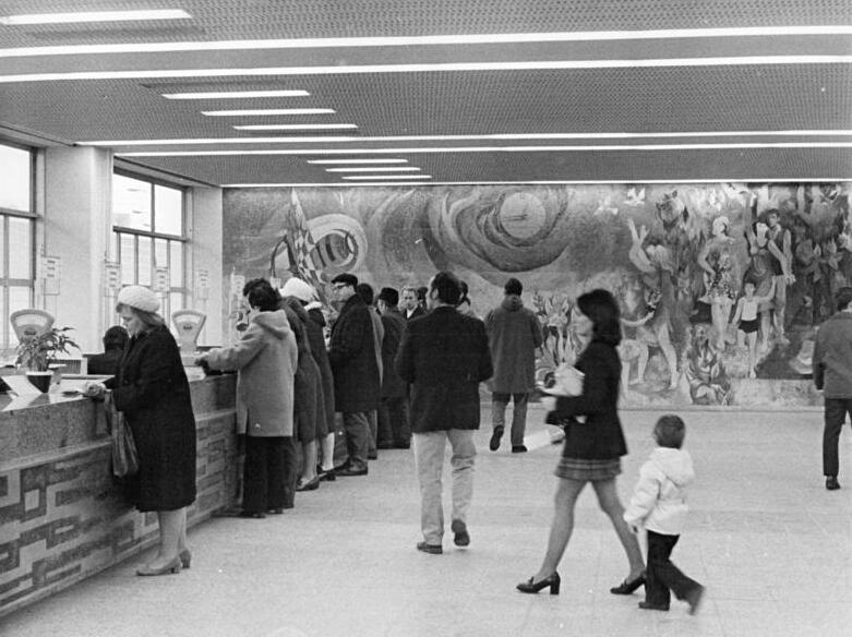 Berlin, Rathausstraße, Postamt, Schalterhalle ADN-ZB Sturm 29.2.1972 Berlin: Ein neues Postamt wurde Ende 1971 in den Neubauten der Rathausstraße im Stadtzentrum eröffnet. Das riesige Wandgemälde, das eine ganze Stirnseite der Schalterhalle einnimmt, schuf der Berliner Maler und Grafiker Adam Kurz